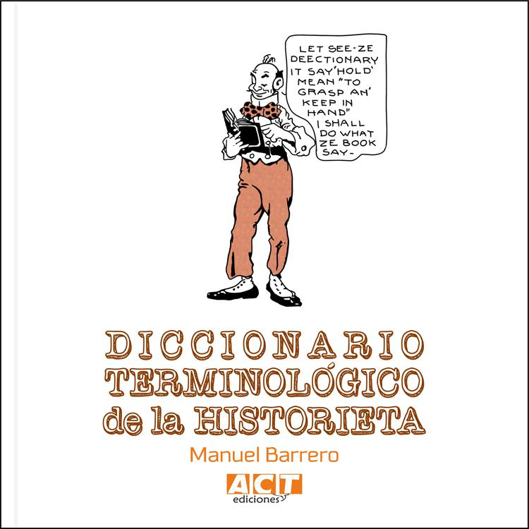 Portada del libro Diccionario terminológico de la historieta (ACyT Ediciones 2015), con ilustración de Ed Carey